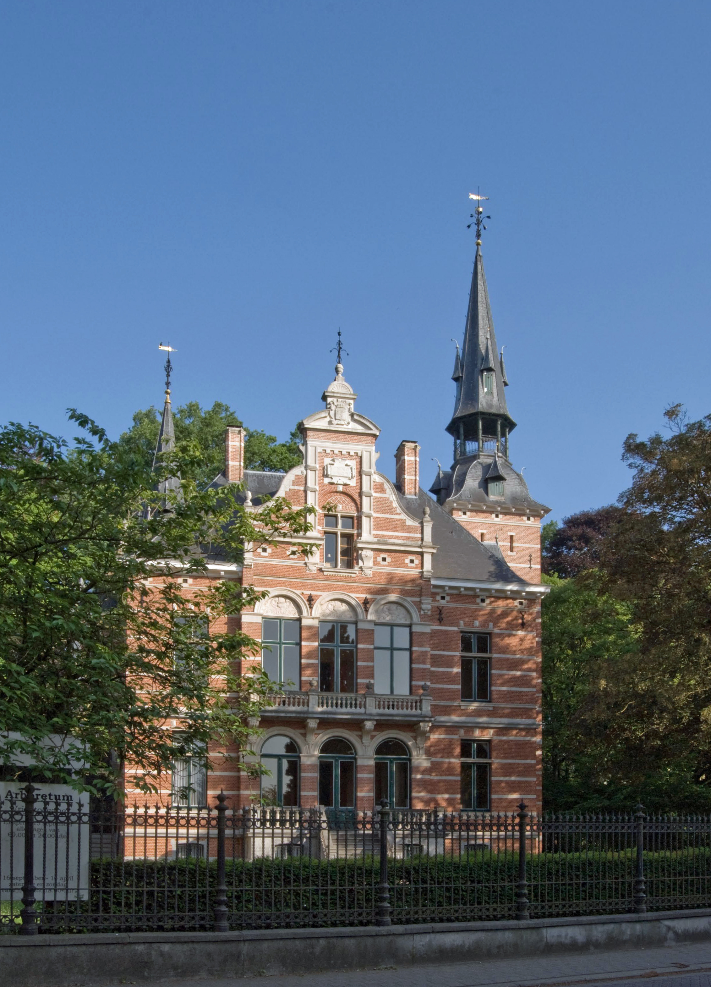 Kasteel Lepaige